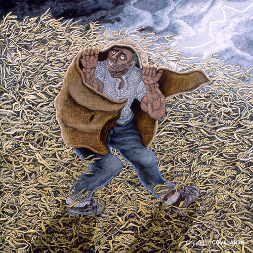 ARRIVA LA TEMPESTA, 2002/03 tecnica mista su tela cm 130 x 130